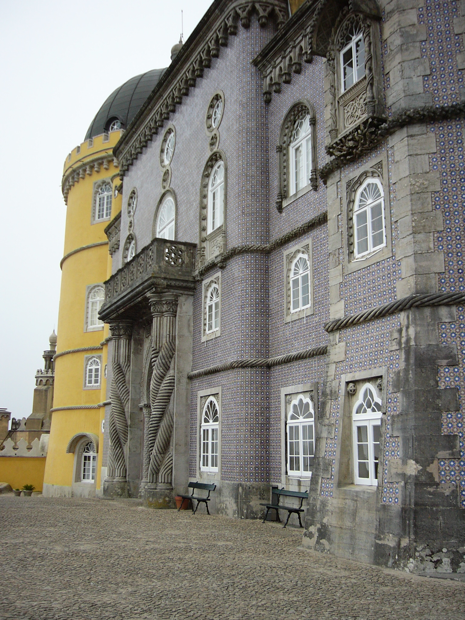 Palacio da Pena, Sintra, Portugal. Foto de Manuel González Olaechea y Franco ©